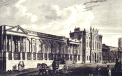 Банка на Англија 1797 година